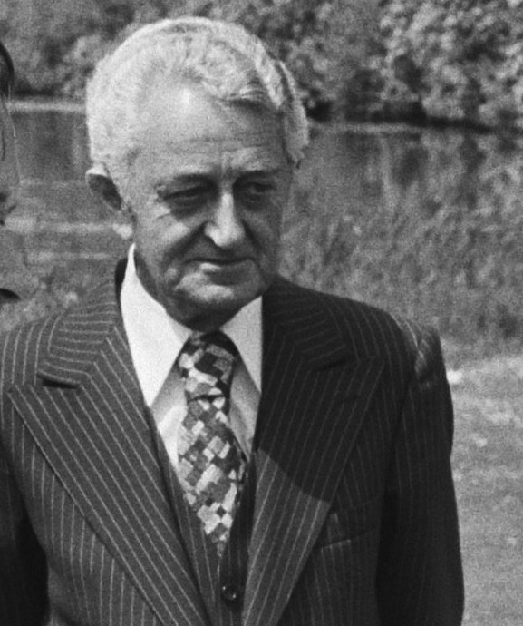 HM ontvangt vaatje haring op Soestdijk, mevr. J. P. van der Horst Baak biedt HM haring aan, midden burgemeester Kieborm (van Vlaardingen)